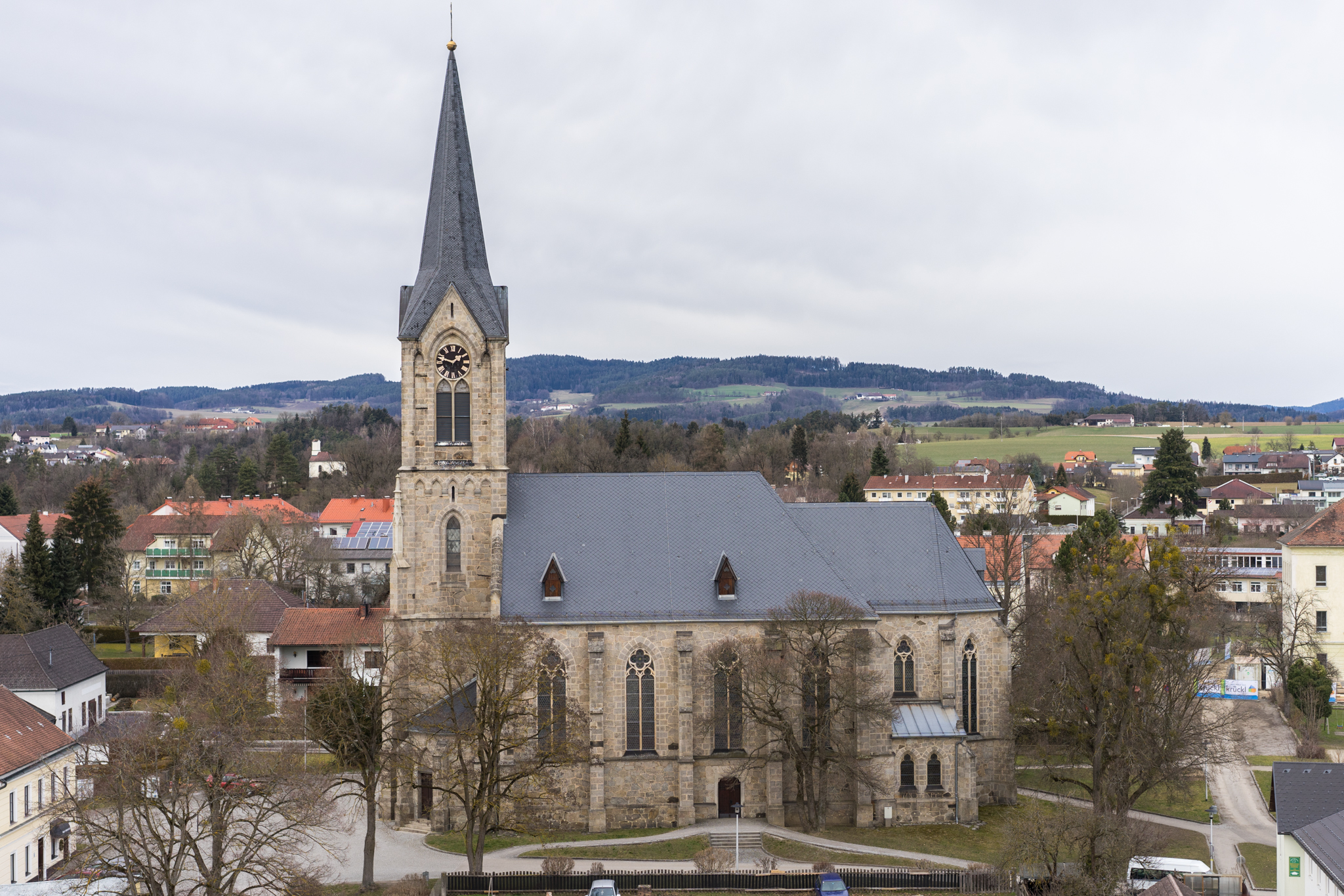 Kath. Pfarrkirche Hl. Anna